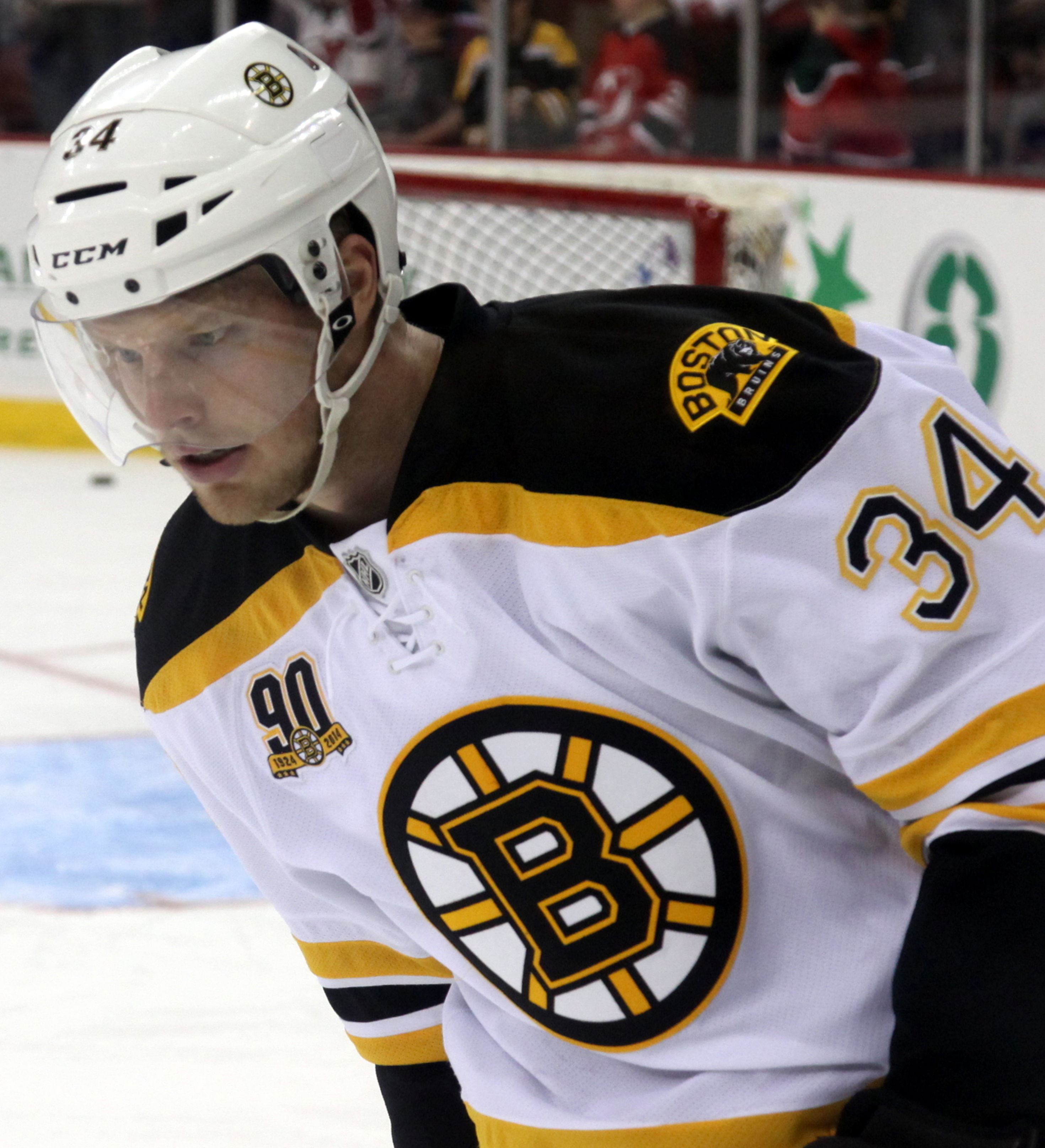 Soderberg in 2014.